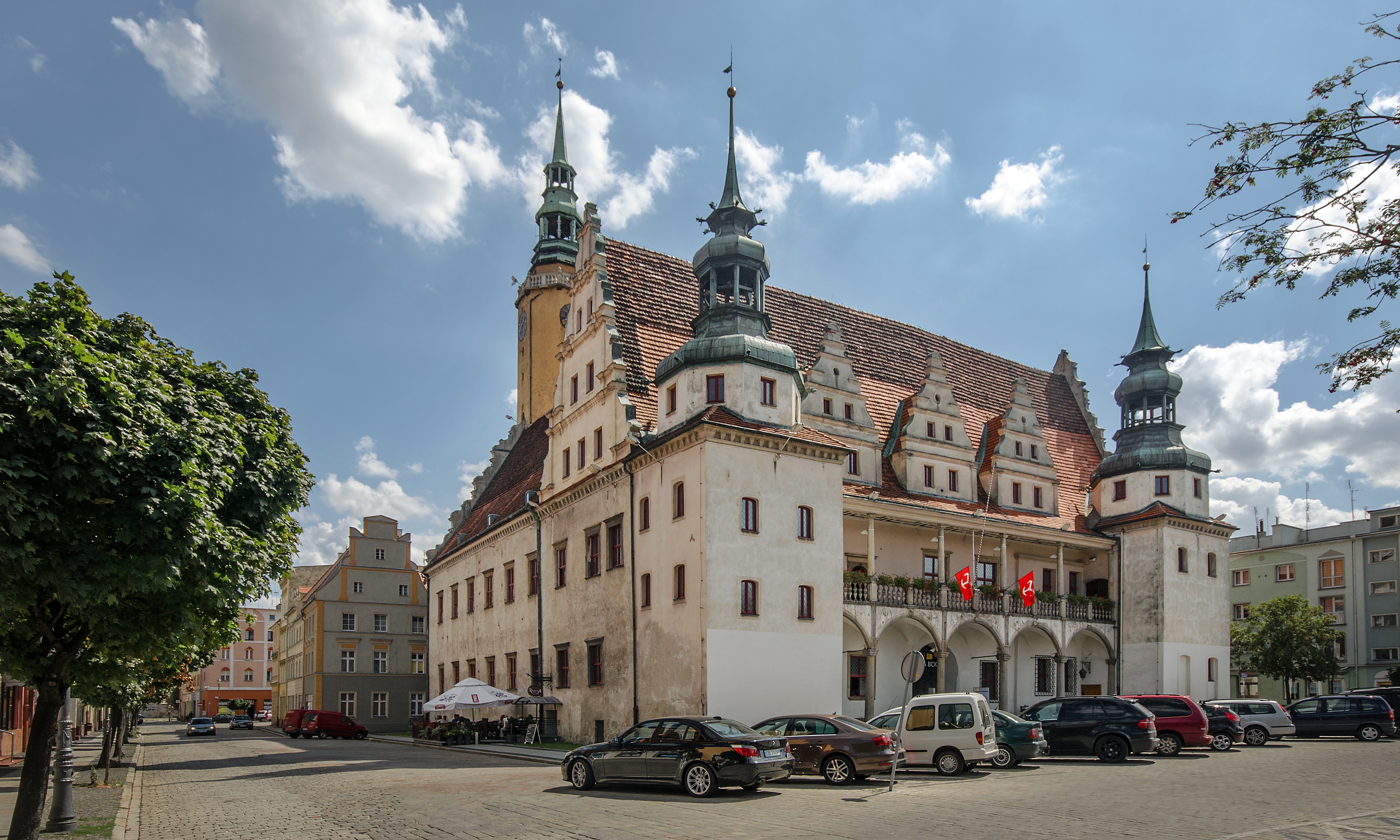 Brzeg, ratusz, XIV, 1570-1577 1746